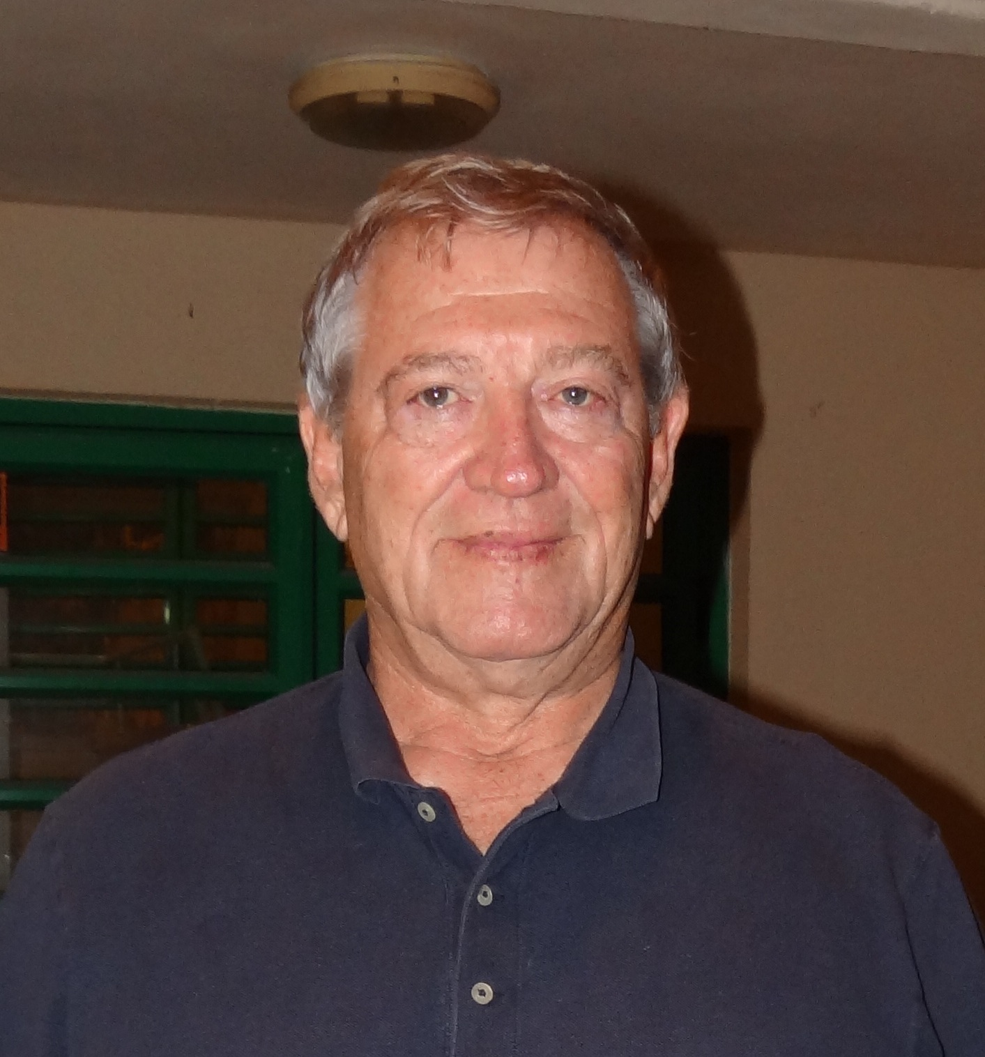 איתמר צ'יזיק הוא מנכ"ל מועדון הכדורגל הישראלי מכבי חיפה מ-2002. התמונות צולמו העת אירוע הצדעה לספורטאים ולספורט בנשר לציון עונת 2014-2013